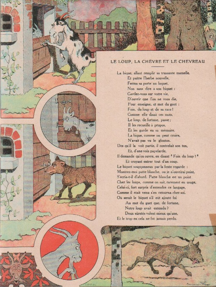 La Fontaine, Le loup, la chèvre et le chevreau, illustration Benjamin Rabier, 1909, scan d'un album de famille.